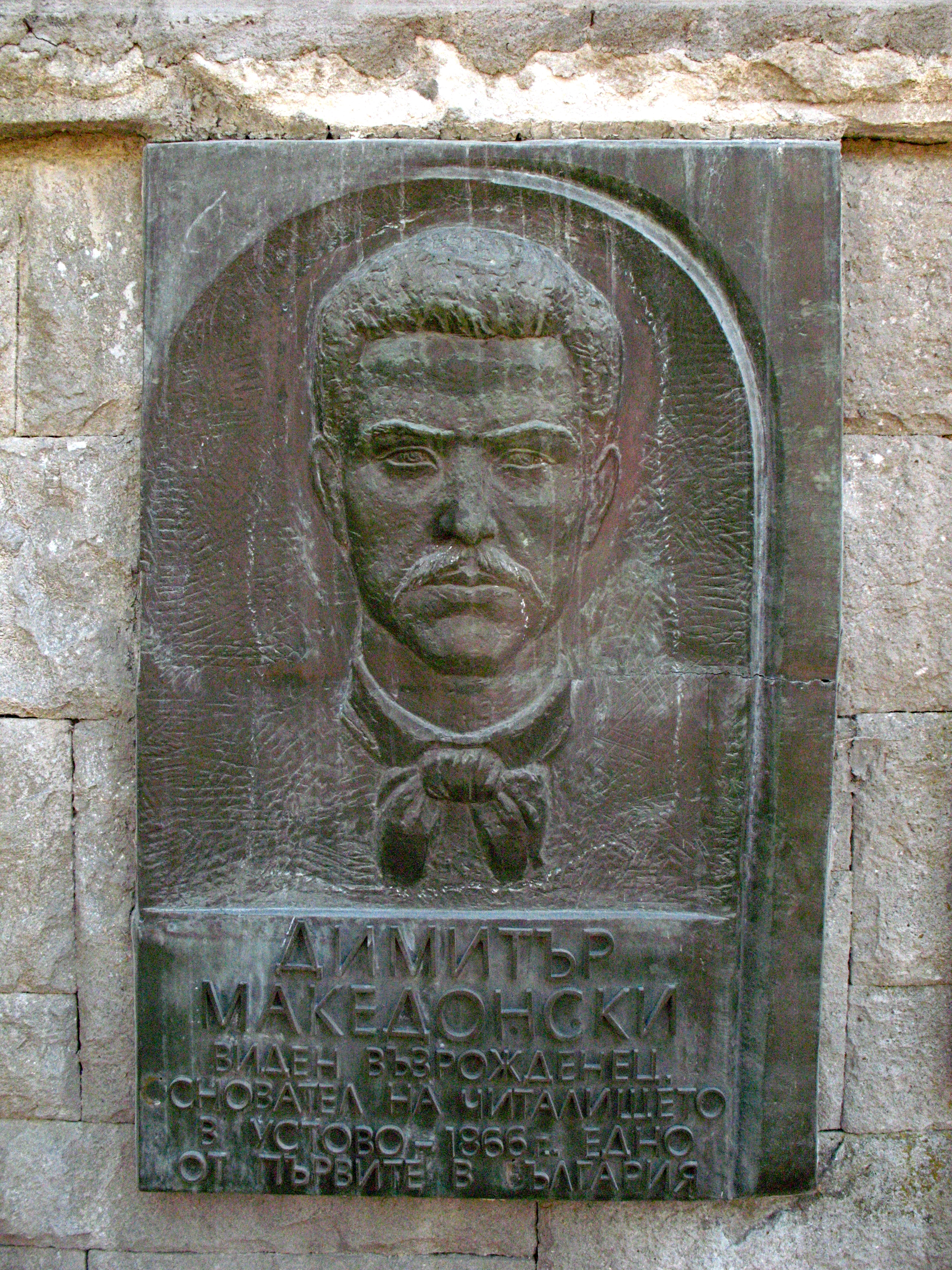 Паметна плоча на Димитър Македонски в Устово, Смолян, България.